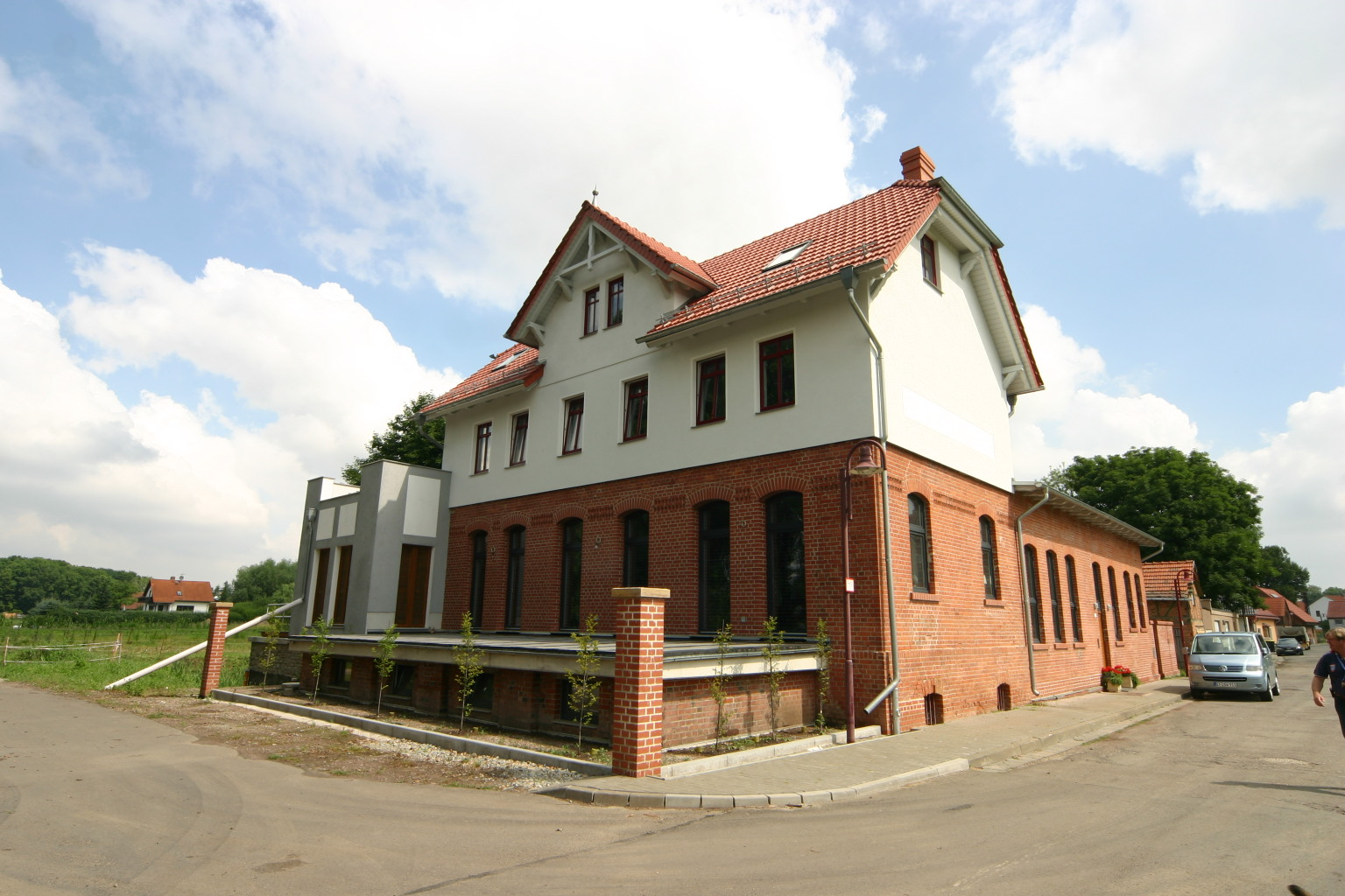 Aktuelles Foto Alte Molkerei